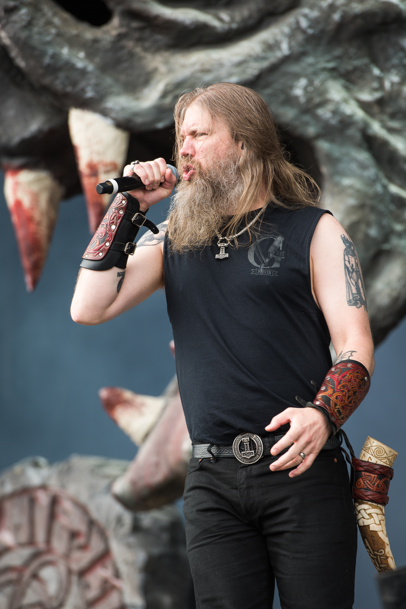 ARGO-Konzerte,Amon Amarth,Festival,Johan Hegg,Konzert,Livekonzert,Livemusik,Musik,RiP,Rock im Park 2016,Seat Zeppelin Stage